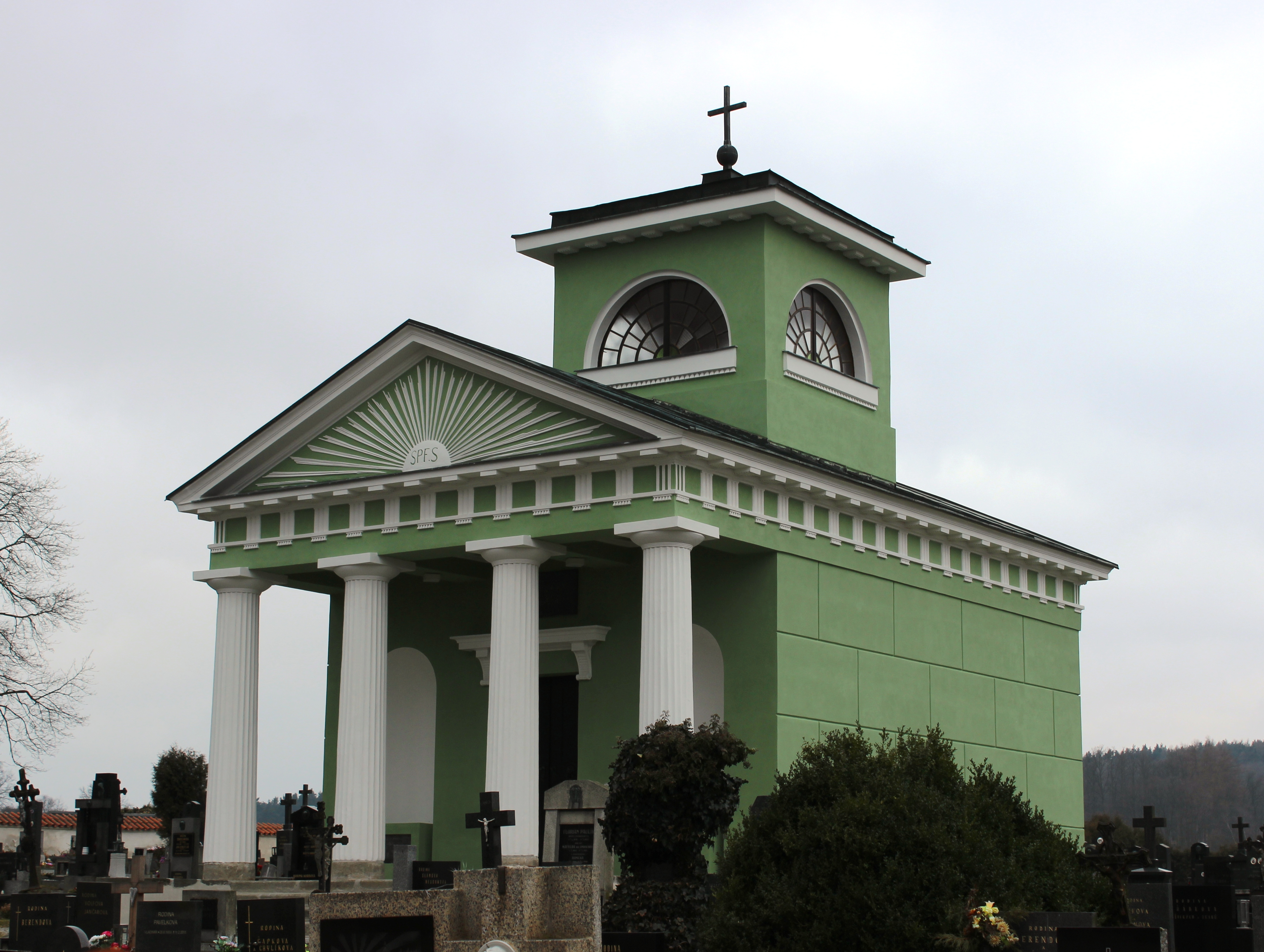 Hřbitov. Kaple po rekonstrukci. Čimelice okres Písek. Česká republika.